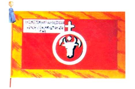 Молдовеняскэ: Steagul_domnitorului_Moldovei_Ieremia_Movilă 1601.